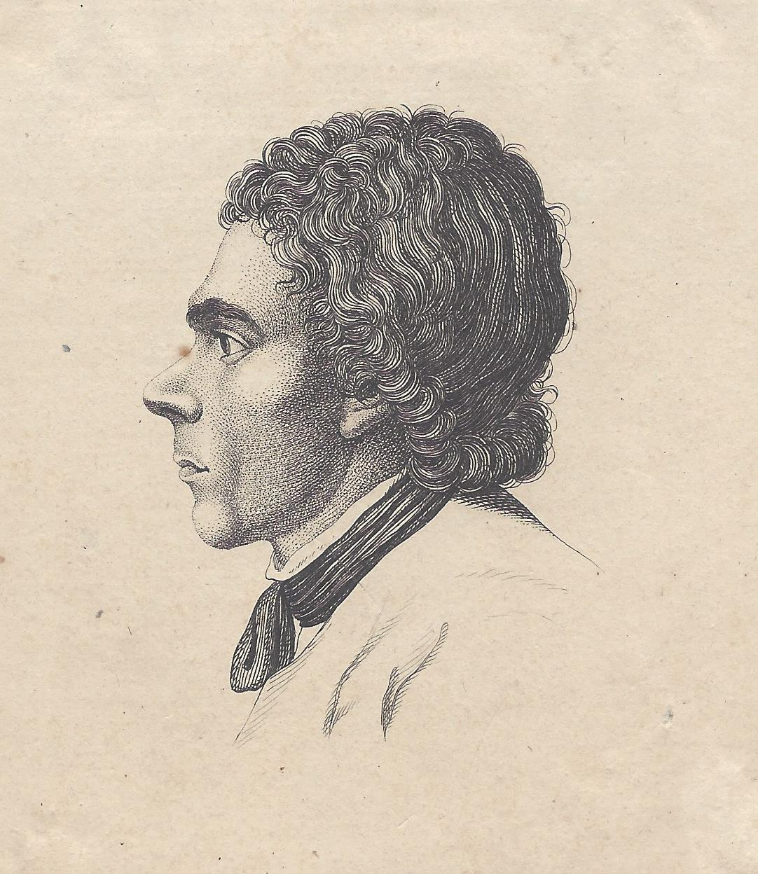 Alt bezeichnete Kupferstichvignette: Johann Christian Edelmann +1767. Aus einer Ausgabe der Physiogomischen Fragmente Johann Kaspar Lavaters.